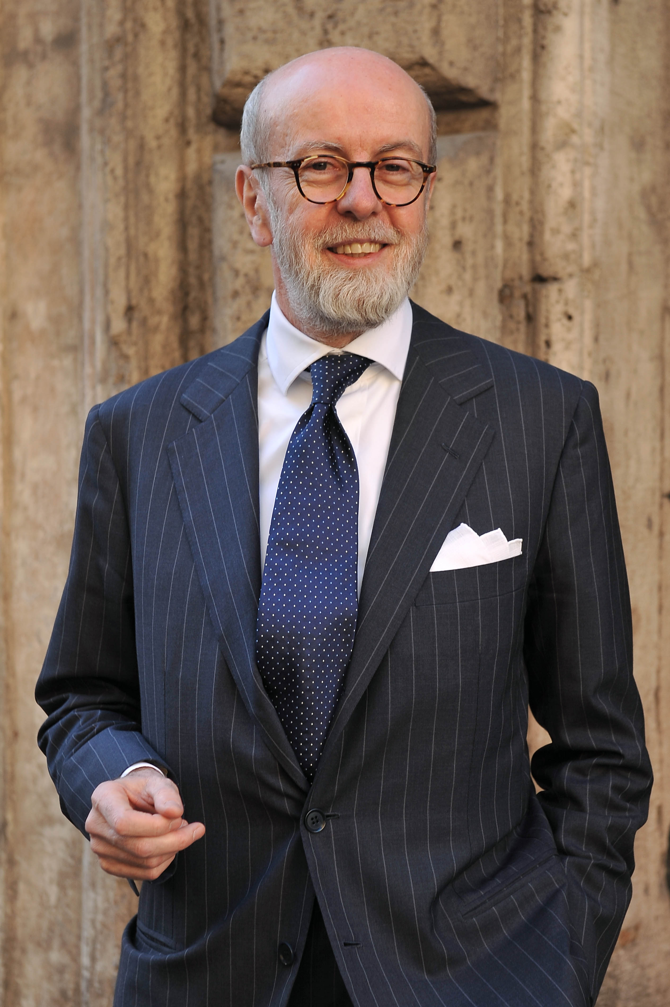 Enrico Tommaso Cucchiani CEO of Intesa Sanpaolo